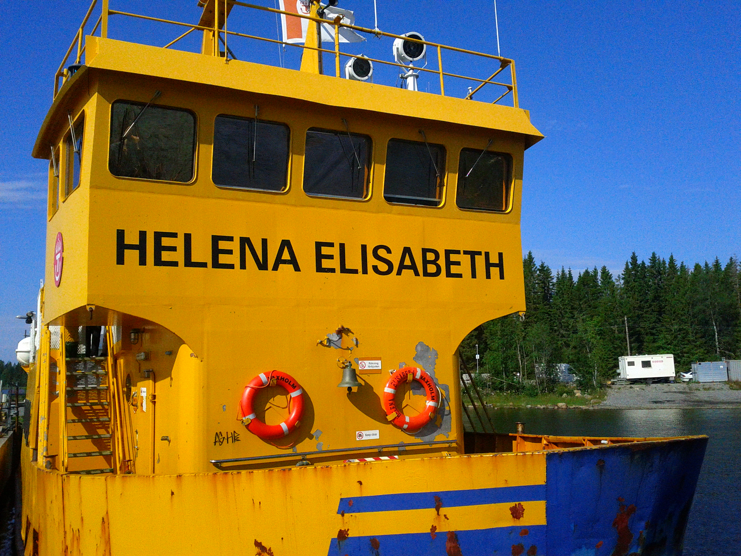 M/S Helena Elisabeth som trafikerar Holmöleden.